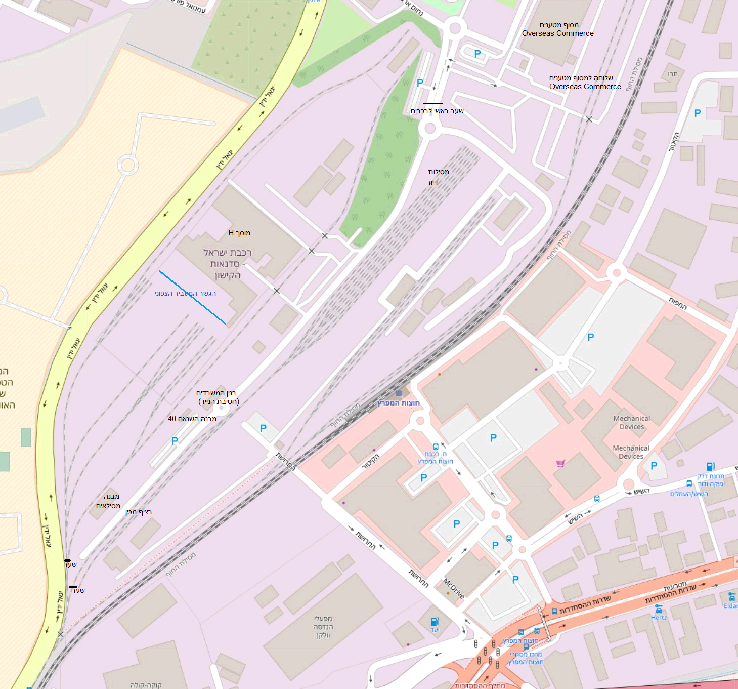 סדנאות אפרים סדנאות קישון